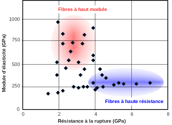 Propriétés mécaniques des fibres de carbone (données extraites de "Fibres de carbone et matériaux composites" P. Delhaes & P. Olry, L'Actualité Chimique, volume 295-296, pages 42-47)